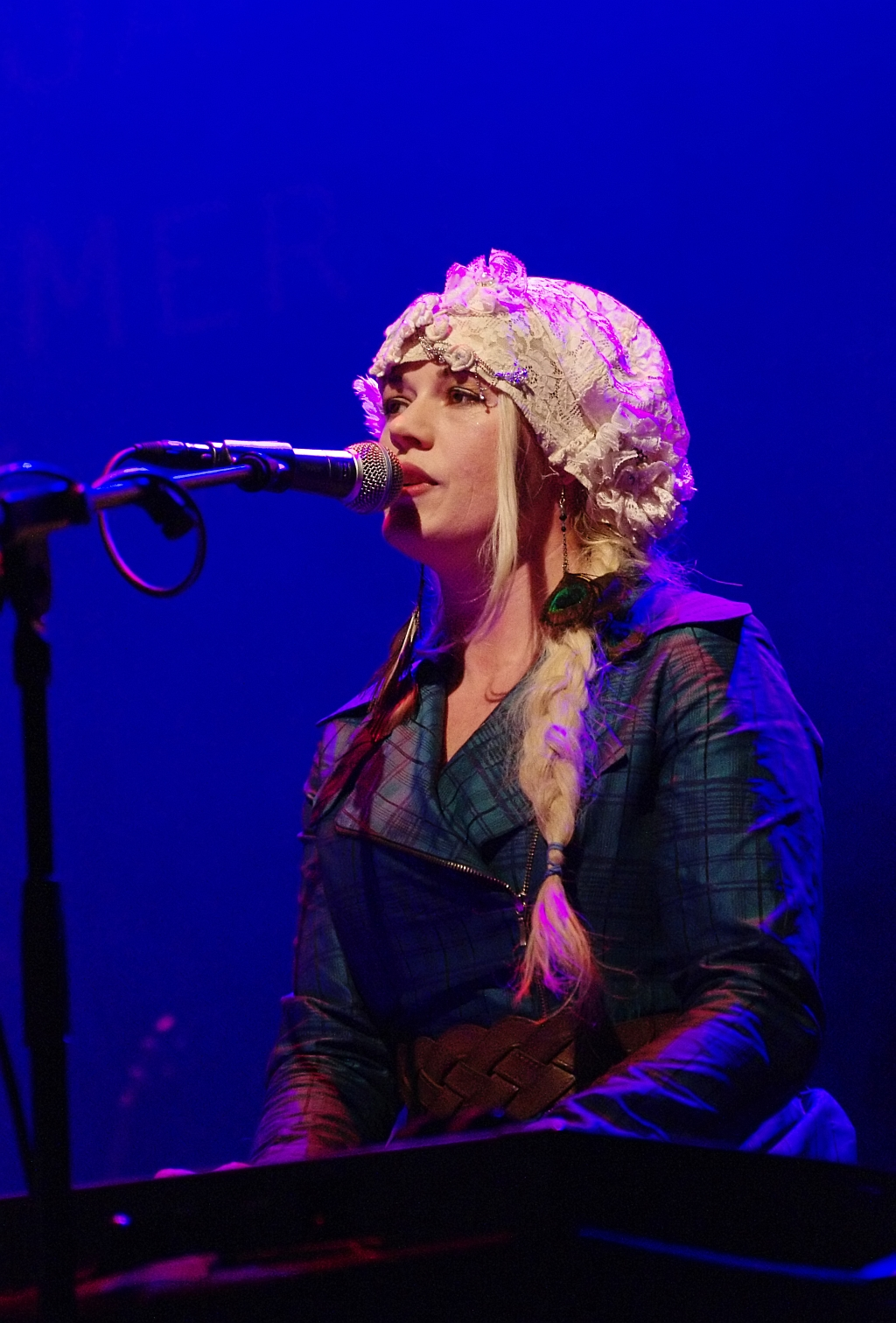 Unni Wilhelmsen, norwegian singer, live at metropool Hengelo, NL